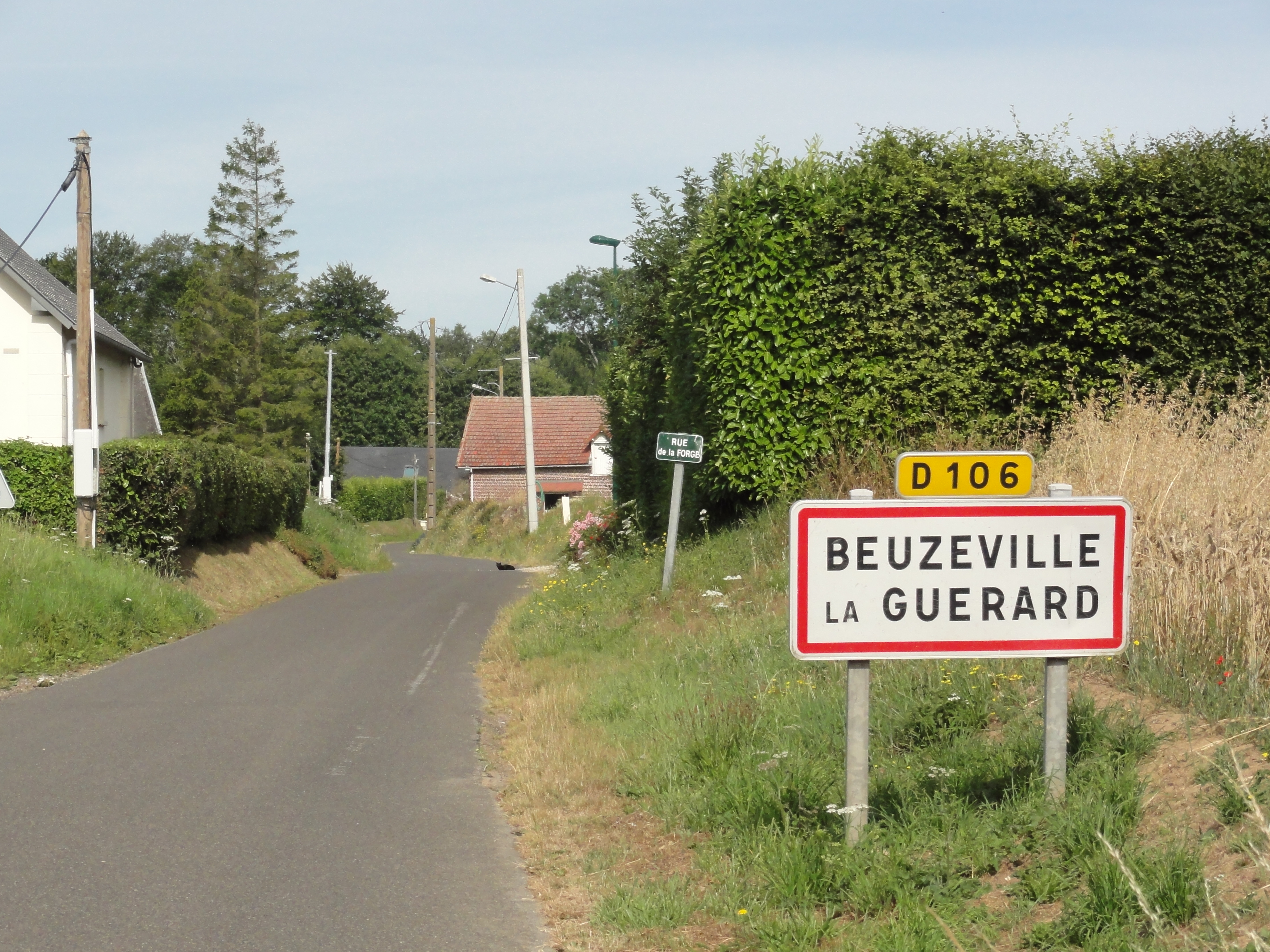 Beuzeville-la-Gúerard (Seine-Mar.) entrée